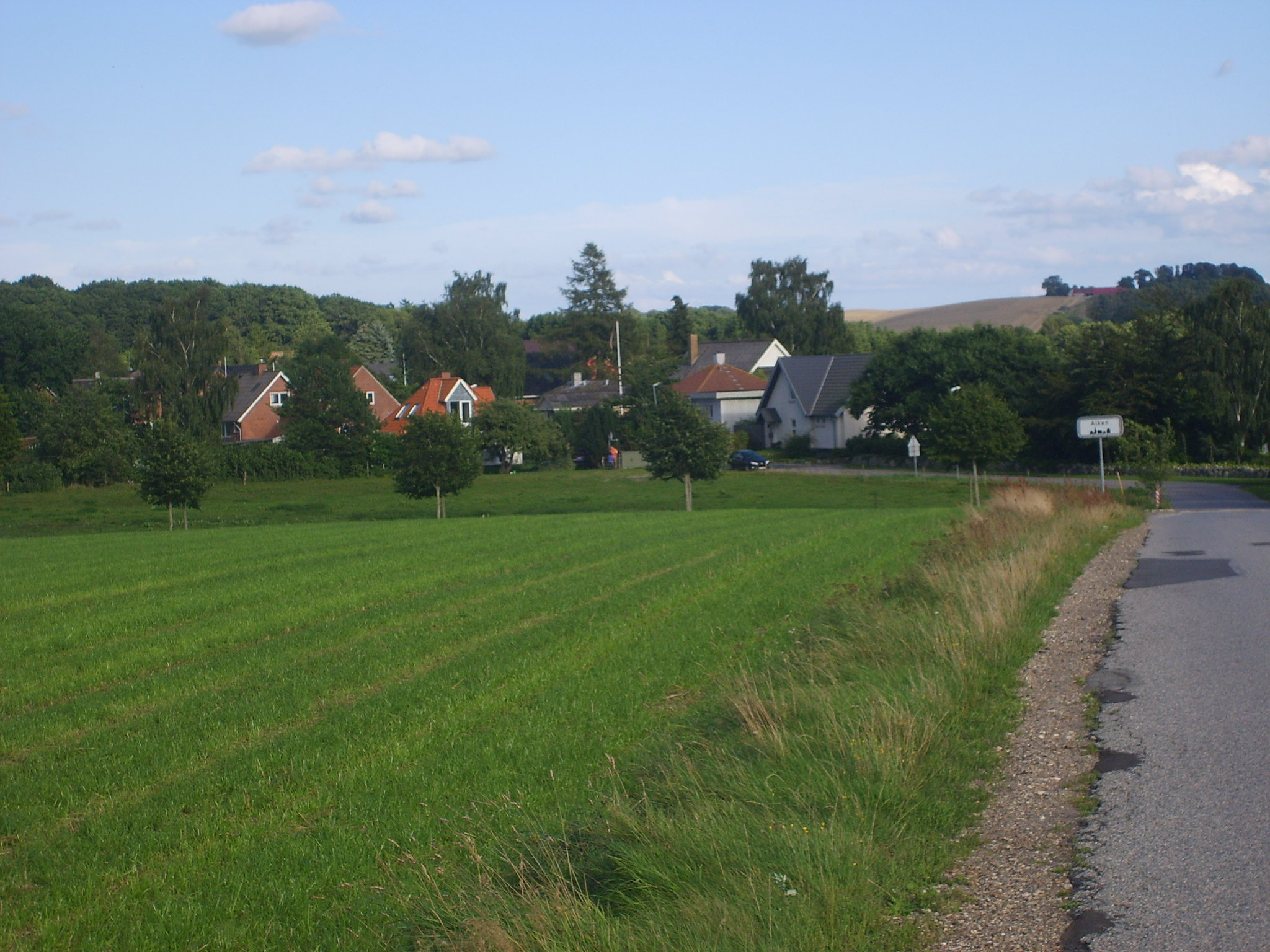 View of Alken, a village in Denmark.